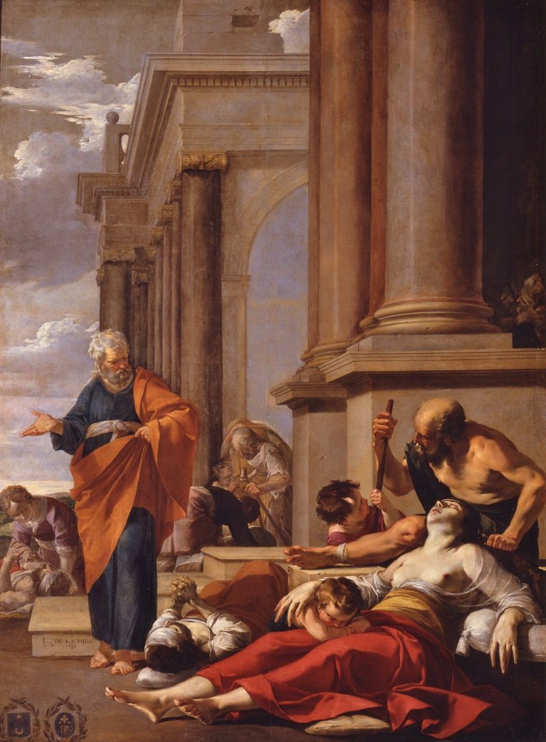 Saint Pierre guérissant des malades de son ombre